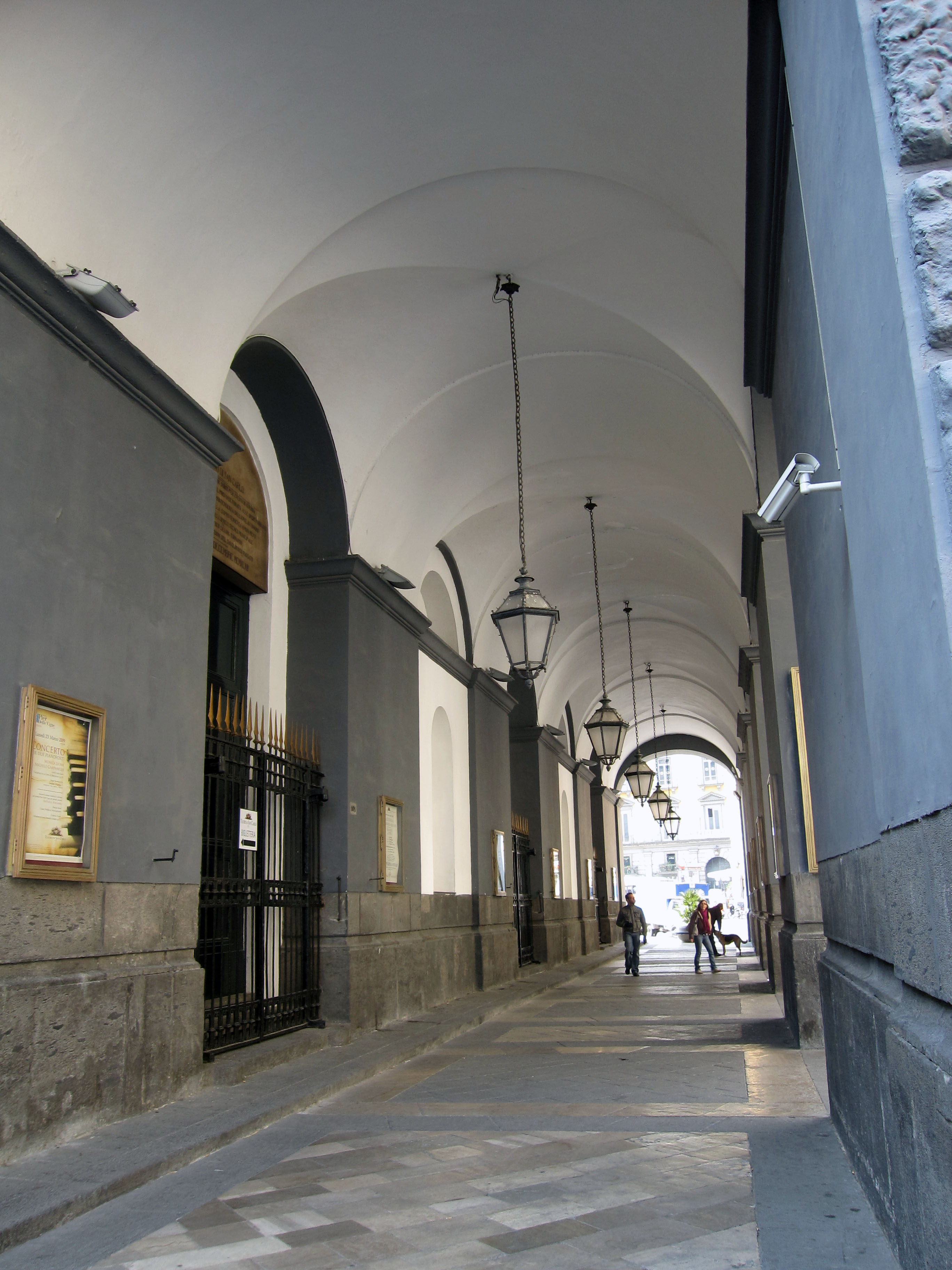 real Teatro San Carlo di Napoli. L'anciporto.